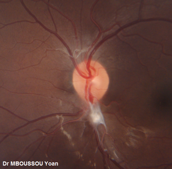 Présence d'un tissu fibreux à l'aspect blanc en zone inférieure de la papille optique